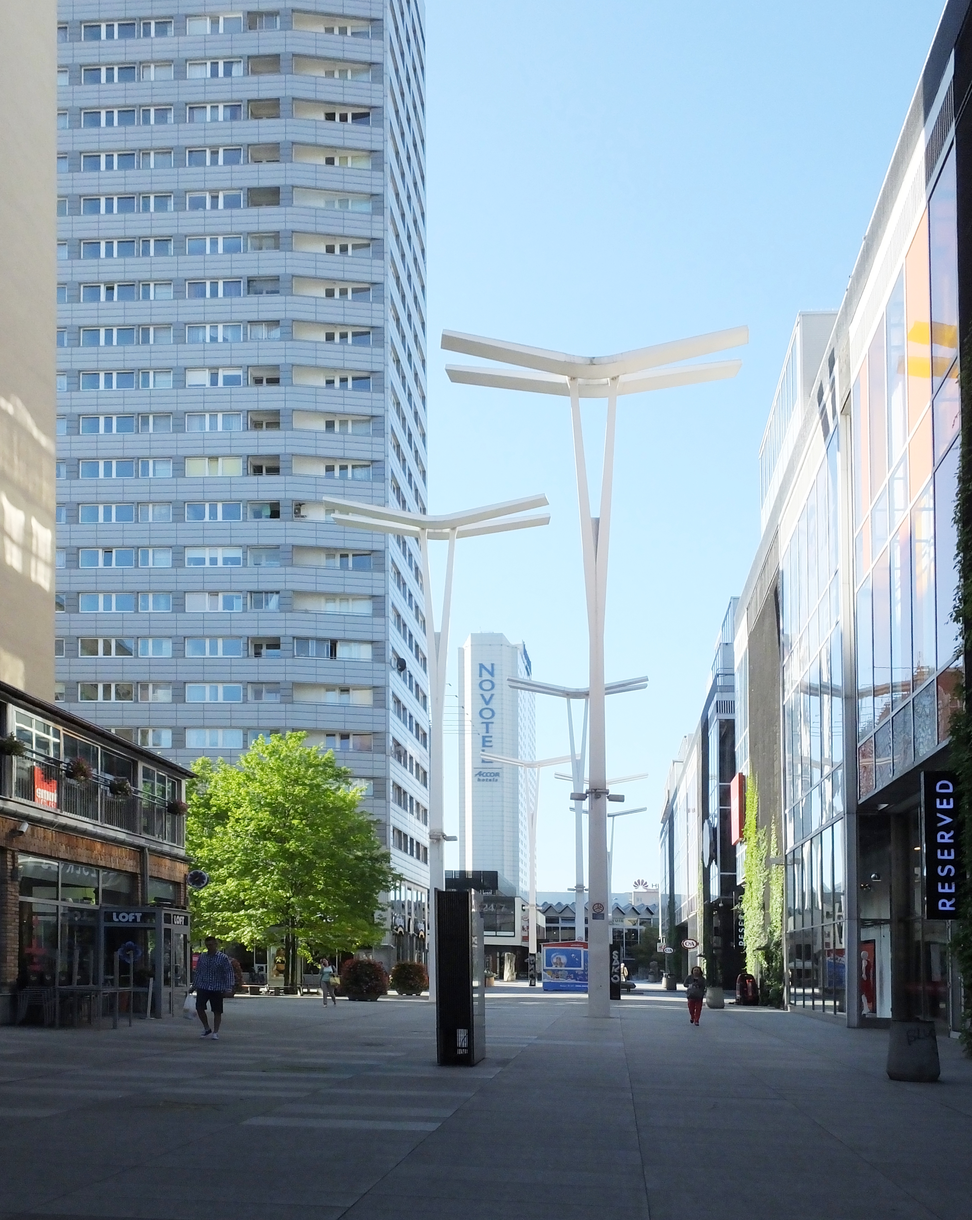 Pasaż Wiecheckiego Wiecha w Warszawie. W głębi dawny Hotel Forum.